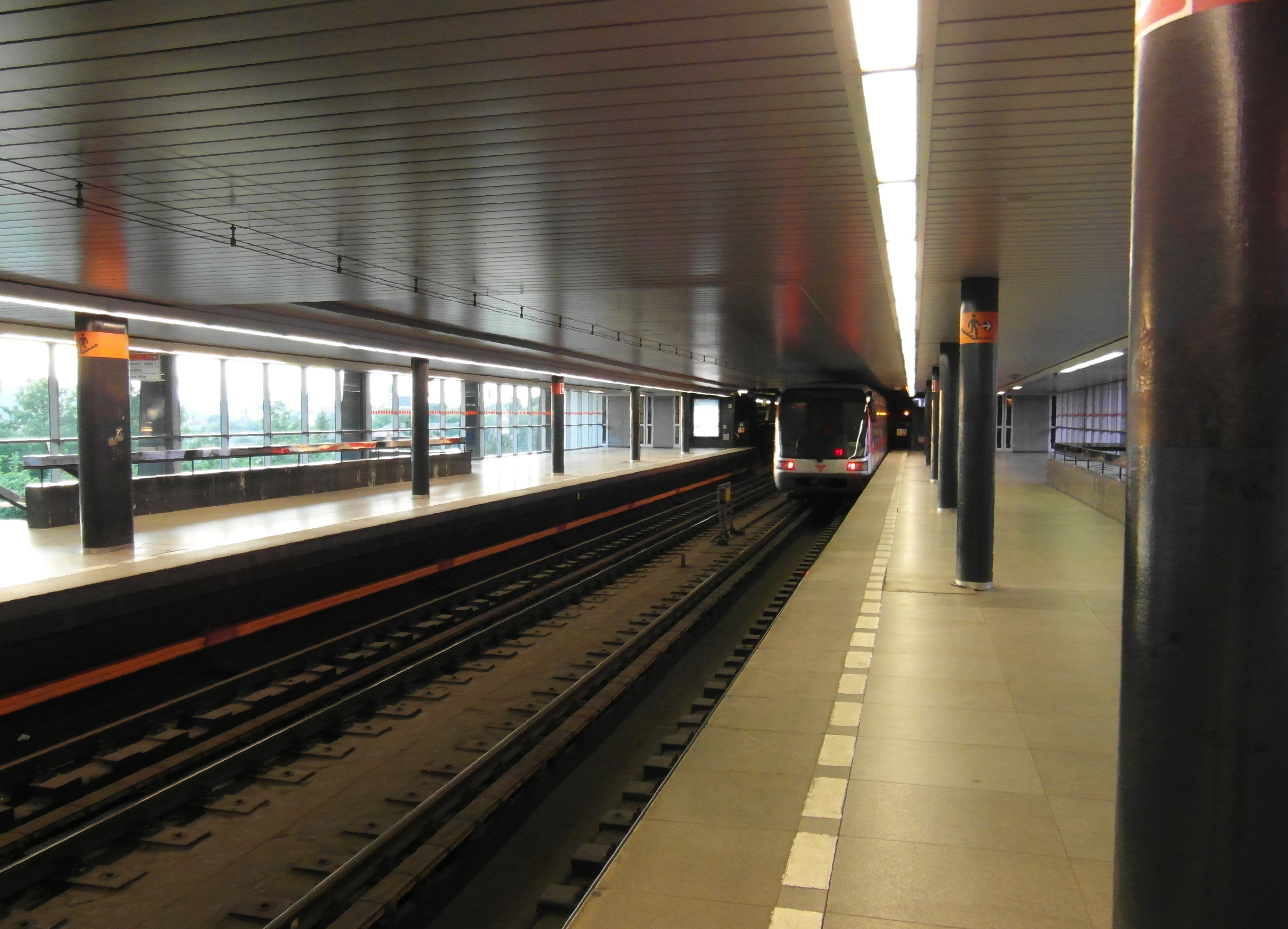 Praha - Metro - Vyšehrad